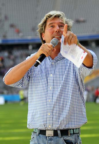 Stefan Schneider, Stadionsprecher TSV 1860 München in der Allianz Arena